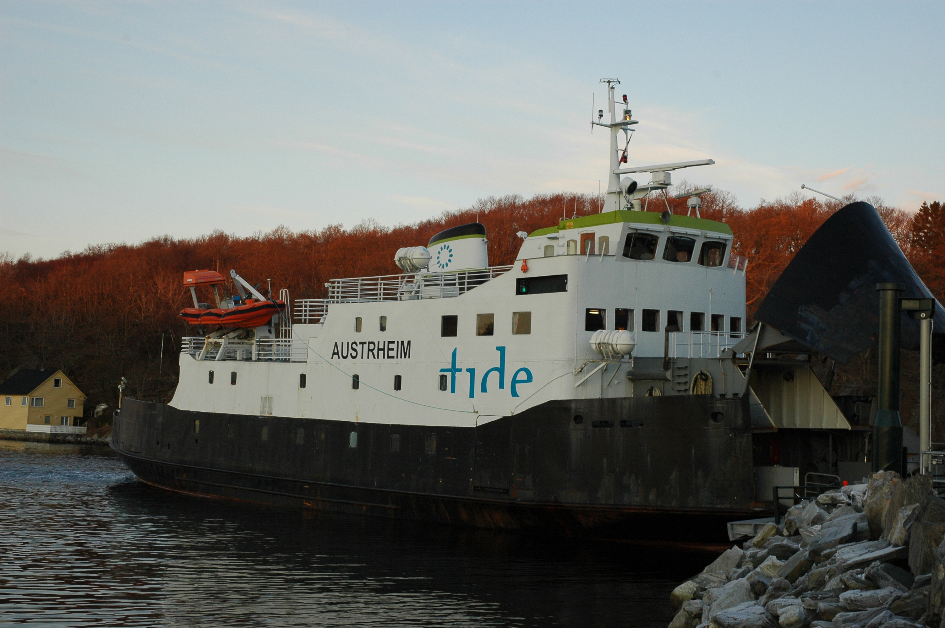 MF Austrheim i Buavåg